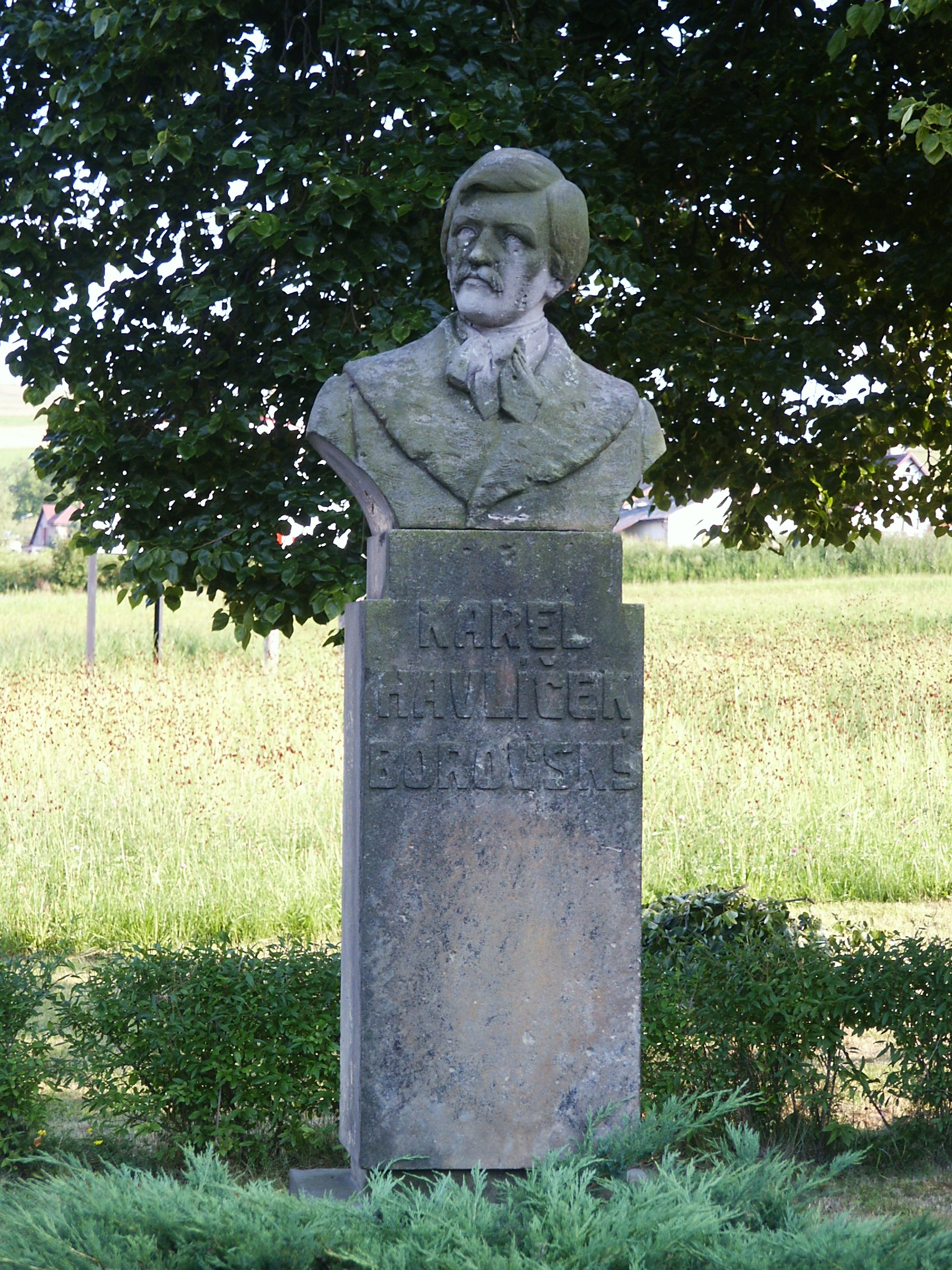 Martinice - busta K. H. Borovského